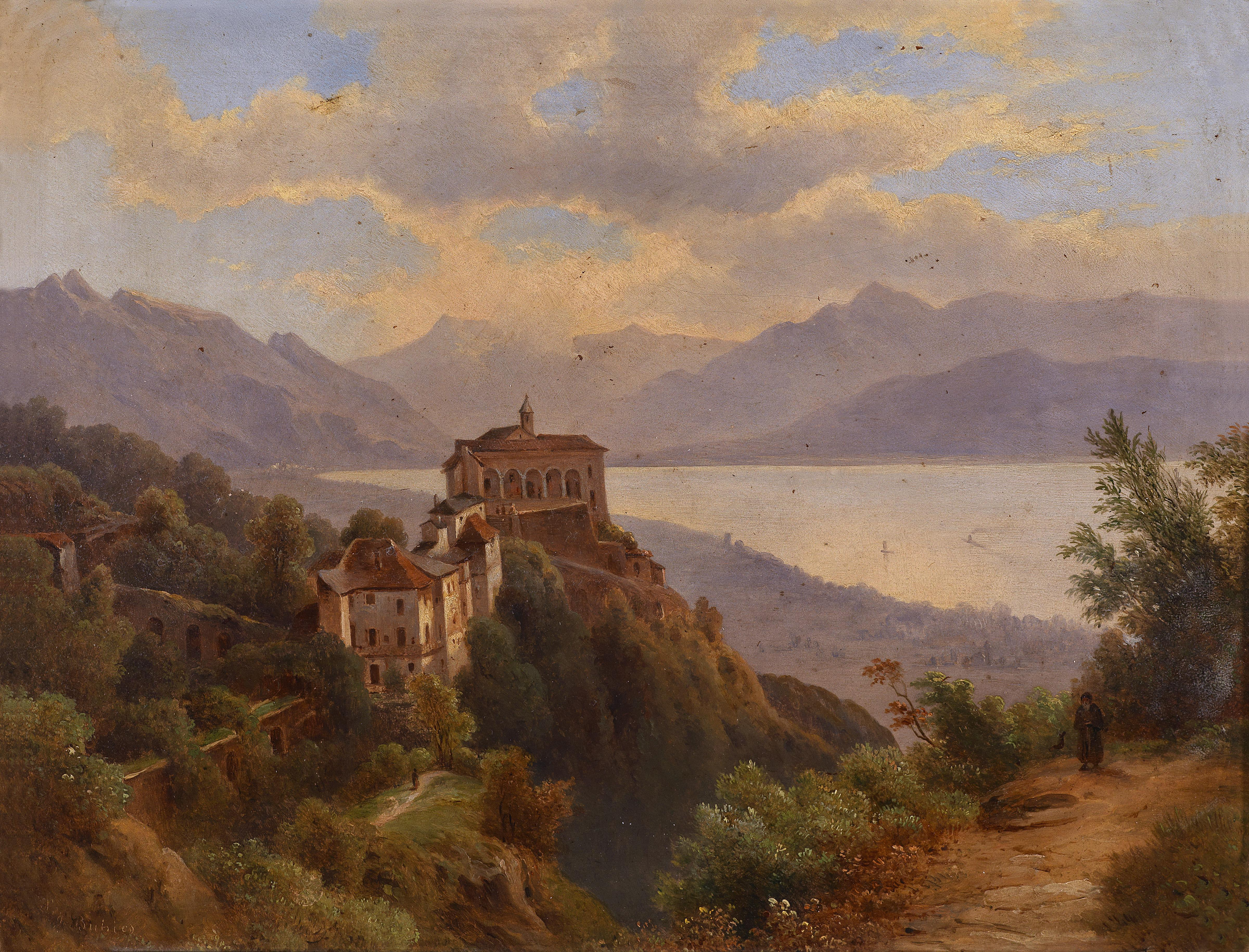 Madonna del Sasso - Lago Maggiore, signiert Sig. Bubics, Öl auf Karton, rückseitig eigenhändige Widmung: Für meinen lieben Freund, seine Excellenz Erzbischof Munkacs Paukovitcs István (in Oberungarn) zur Erinnerung ... 1870, 28,5 x 35,5 cm